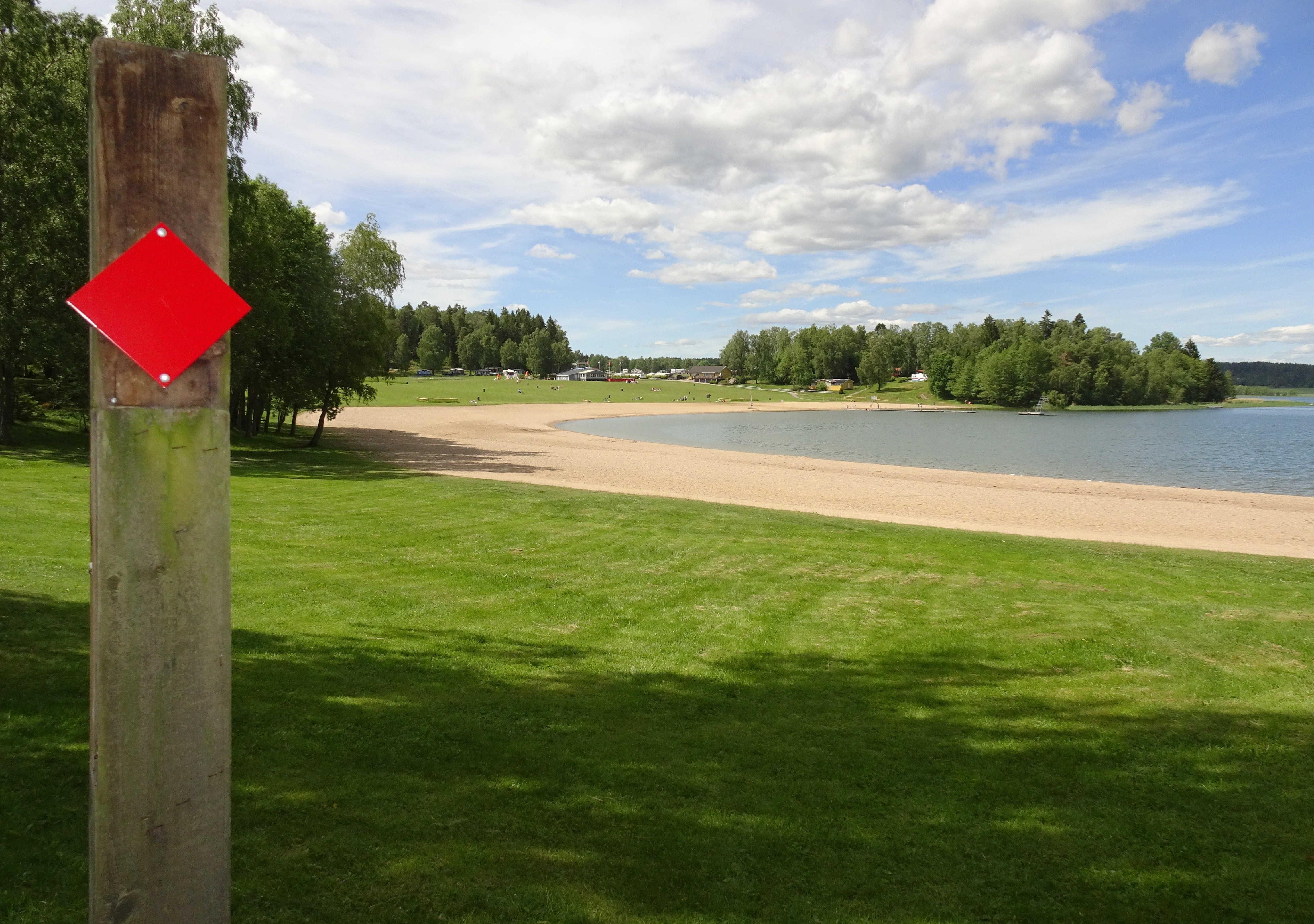 Farstanäs naturreservat, badstrand